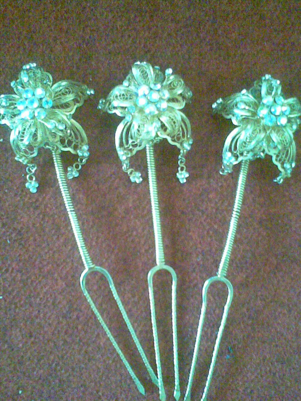 Cunduk mentul adalah salah satu hiasan atau asesoris yang dikenakan di sanggul penari Gambyong Pareanom